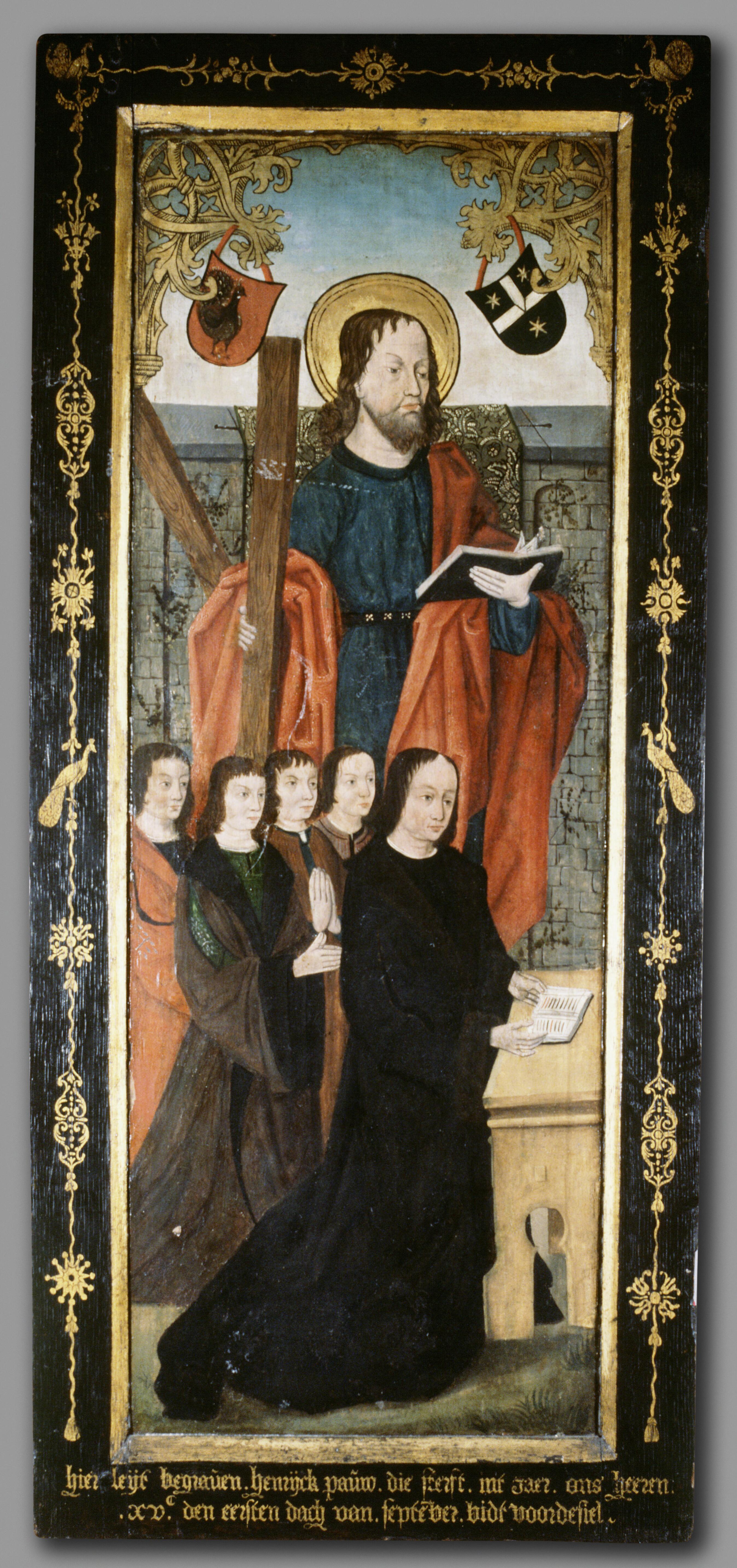 Personen von links nach rechts: Hendrik Pauw (1450-1500), Reinier Pauw (gest. 1541), Dirk Pauw (gest. 1530), Gerard Pauw (gest. 1567) und Frans Pauw